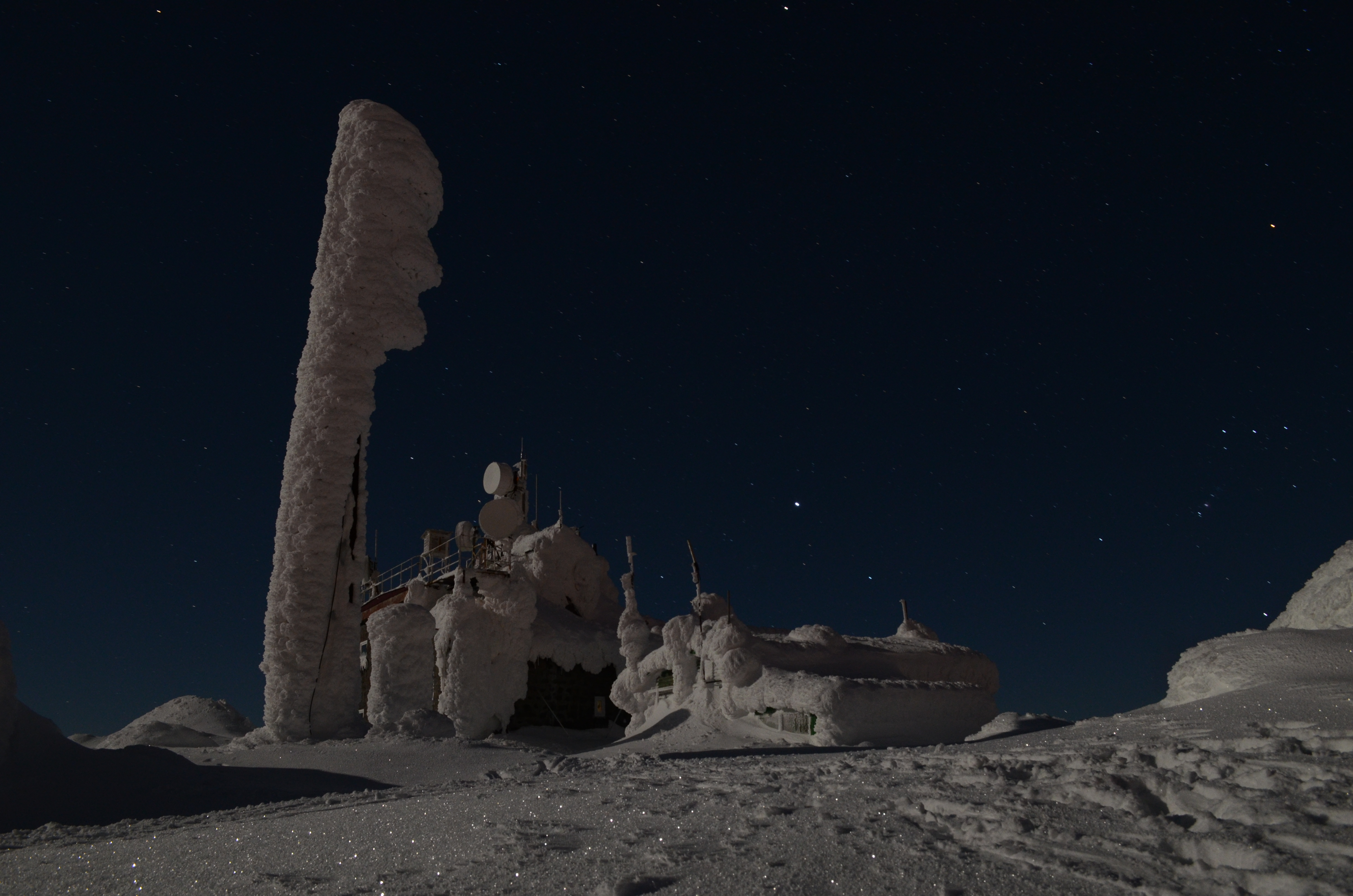 Витоша, Витоша